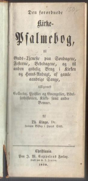 Den forordnede Kirkesalmebok